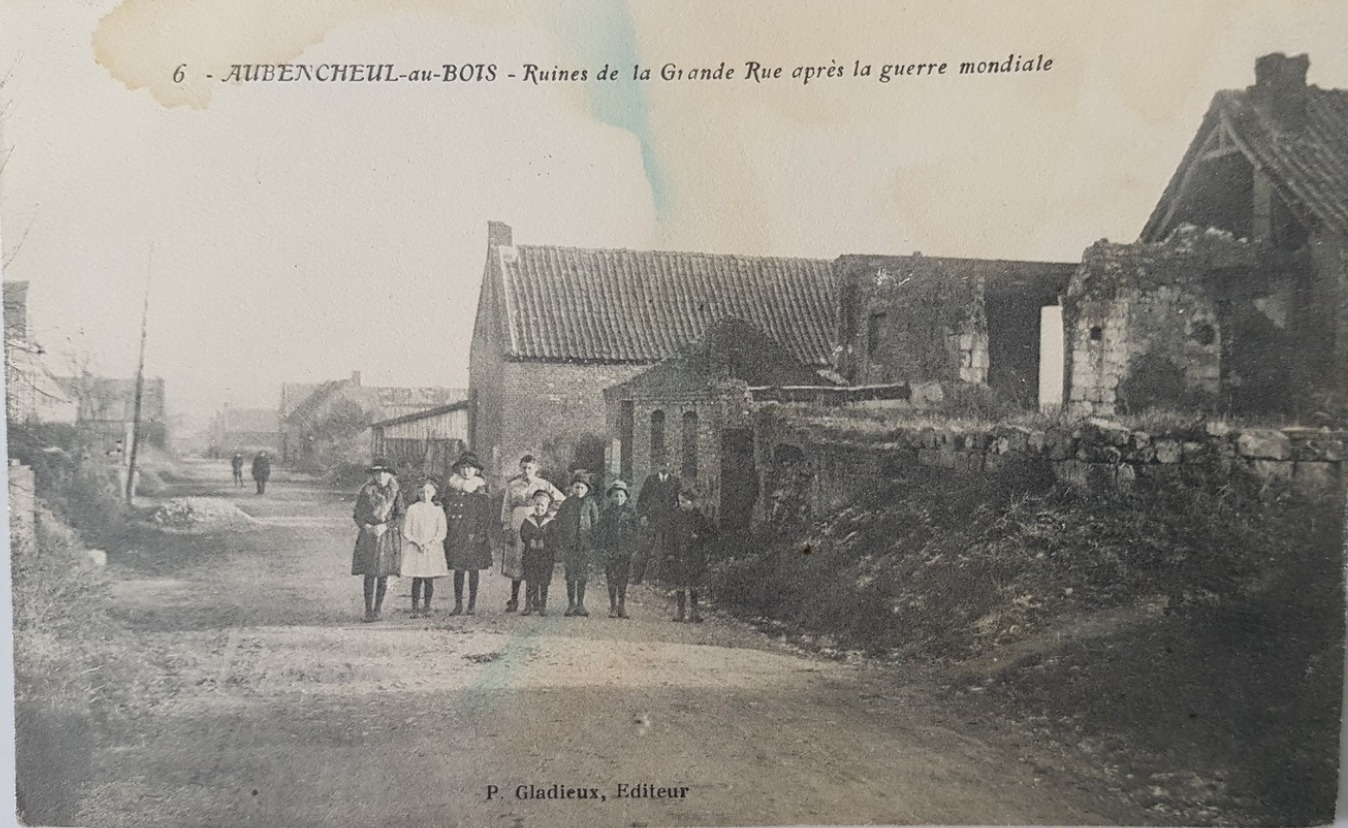 Carte postale vers 1920